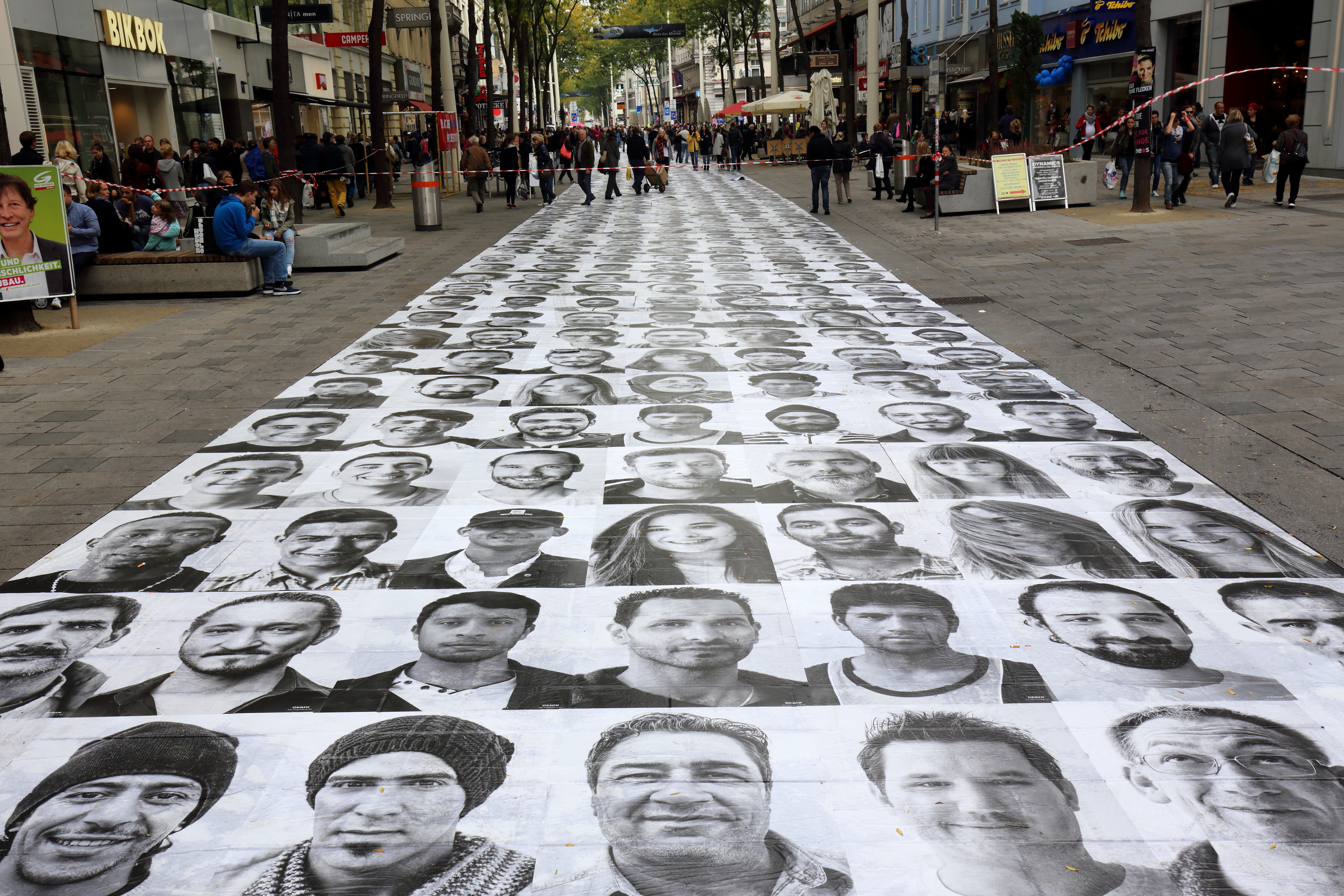 Flüchtlingsporträts auf der Mariahilfer Straße in Wien.Im Zuge der Demonstration „Flüchtlinge Willkommen!“ am 3. Oktober 2015 mit 20.000 (lt. Polizei) und 60.000 Teilnehmer (lt. Veranstalter) wurde als Teil der Demonstration die Mariahilfer Straße auf einer Länge von rund 300 Metern mit 2.100 Plakaten, die Flüchtlinge und Helfer zeigen, beklebt.